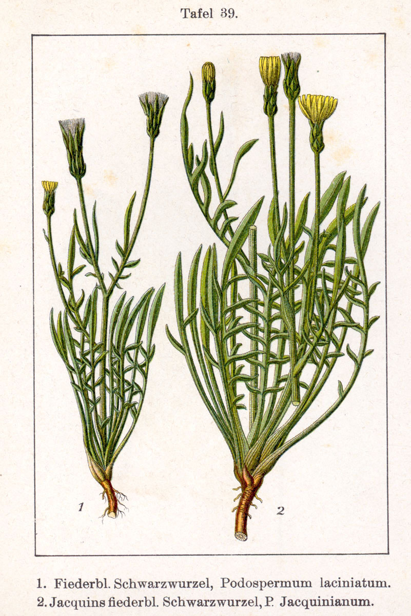 1. Scorzonera laciniata L., syn. Podospermum laciniatum (L.) DC. 2. Scorzonera cana (C. A. Mey.) Griseb., syn. Podospermum jacquinianum W. D. J. Koch Original Description 1. Fiederblättrige Schwarzwurzel, Podospermum laciniatum 2. Jacquins fiederblättrige Schwarzwurzel, Podospermum jacquinianum